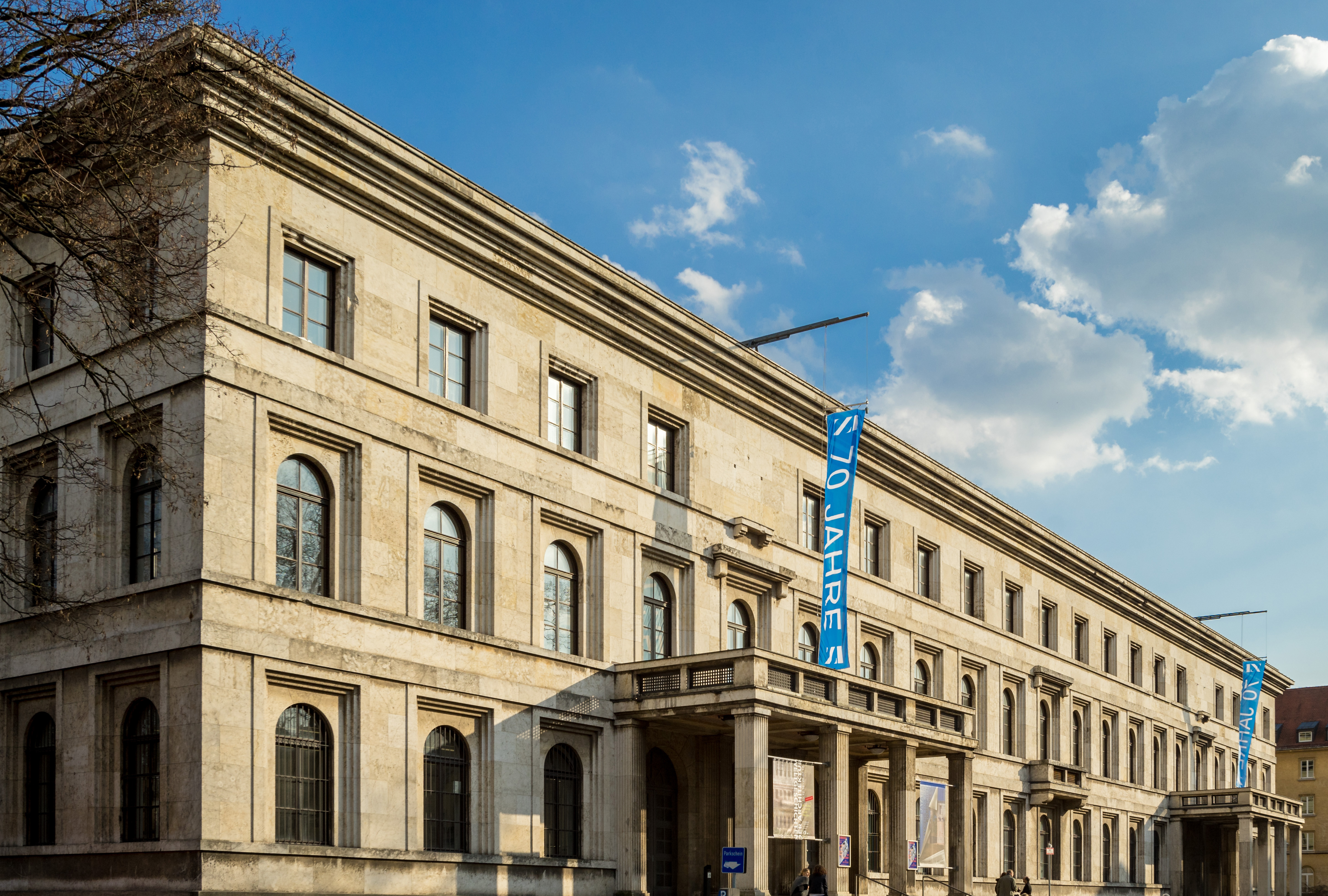 Zentralinstitut fuer Kunstgeschichte